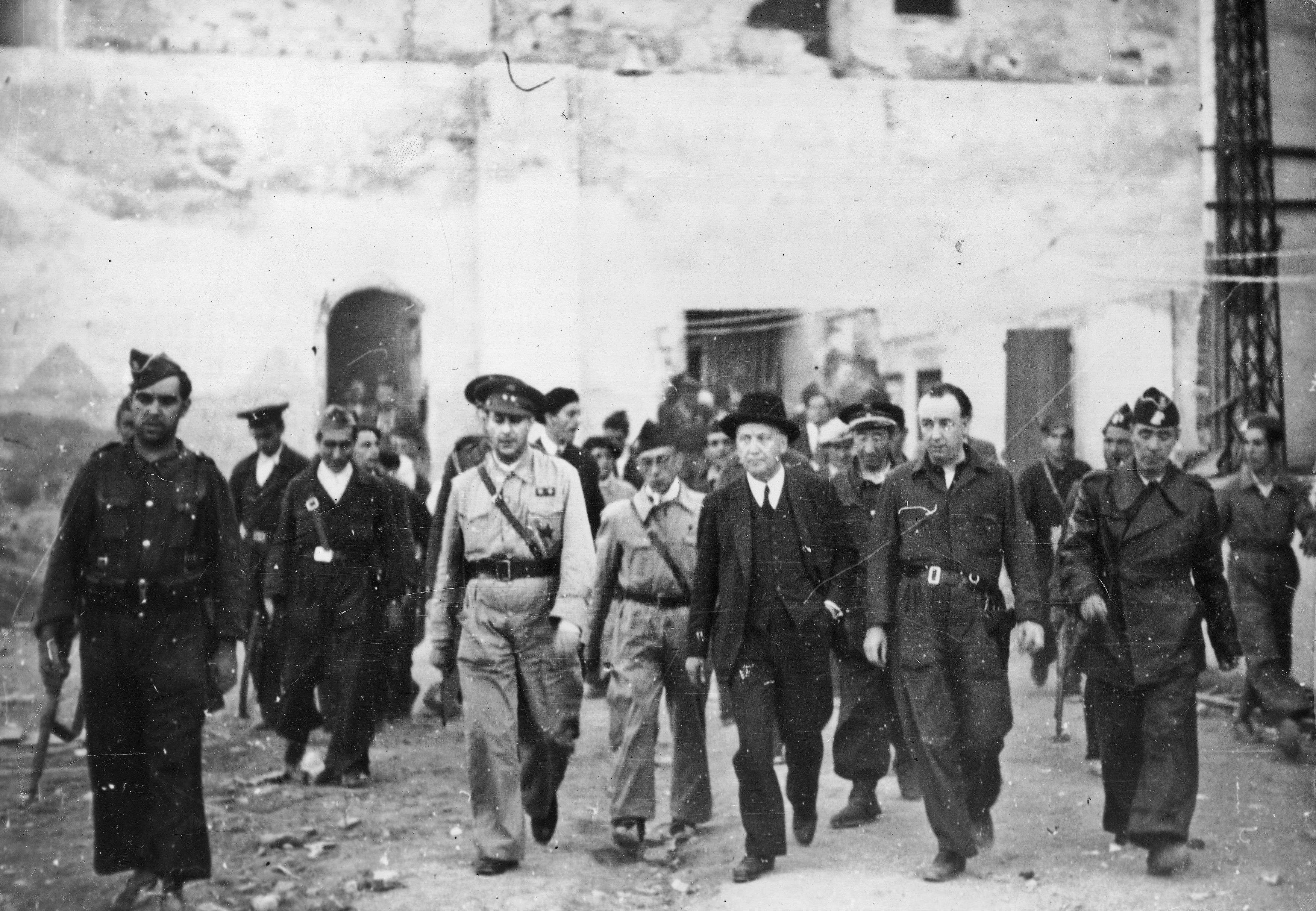 Francisco Largo Caballlero visita el asedio del Alcázar de Toledo, acompañado de milicianos y oficiales del Ejército republicano.